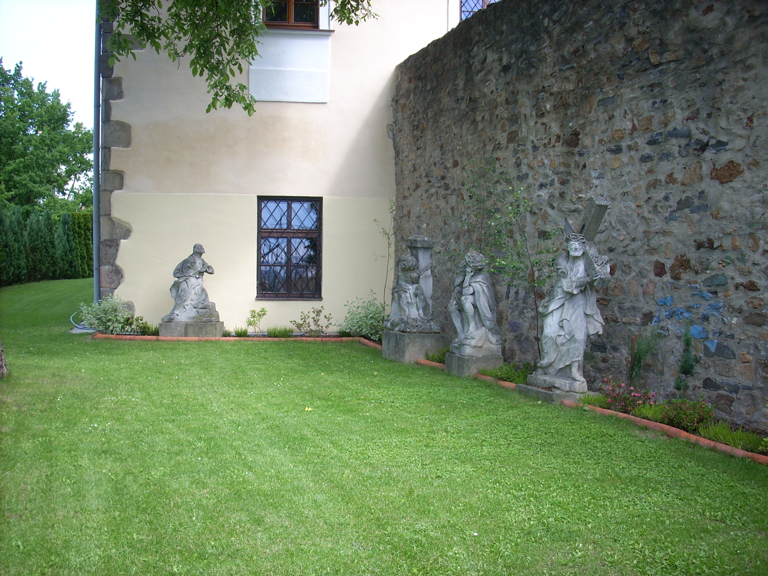 Minoritské náměstí, klášter sochy v zahradě